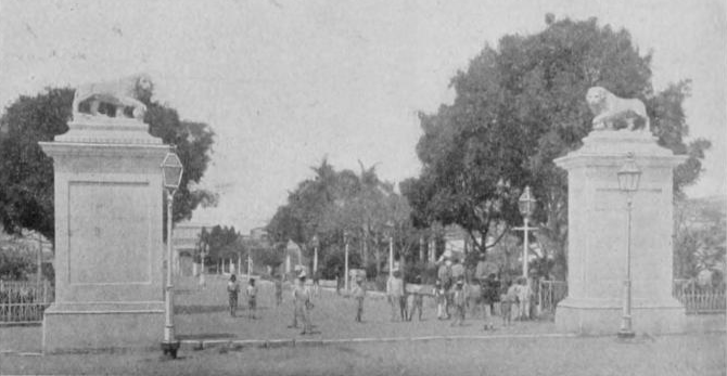 Cuba